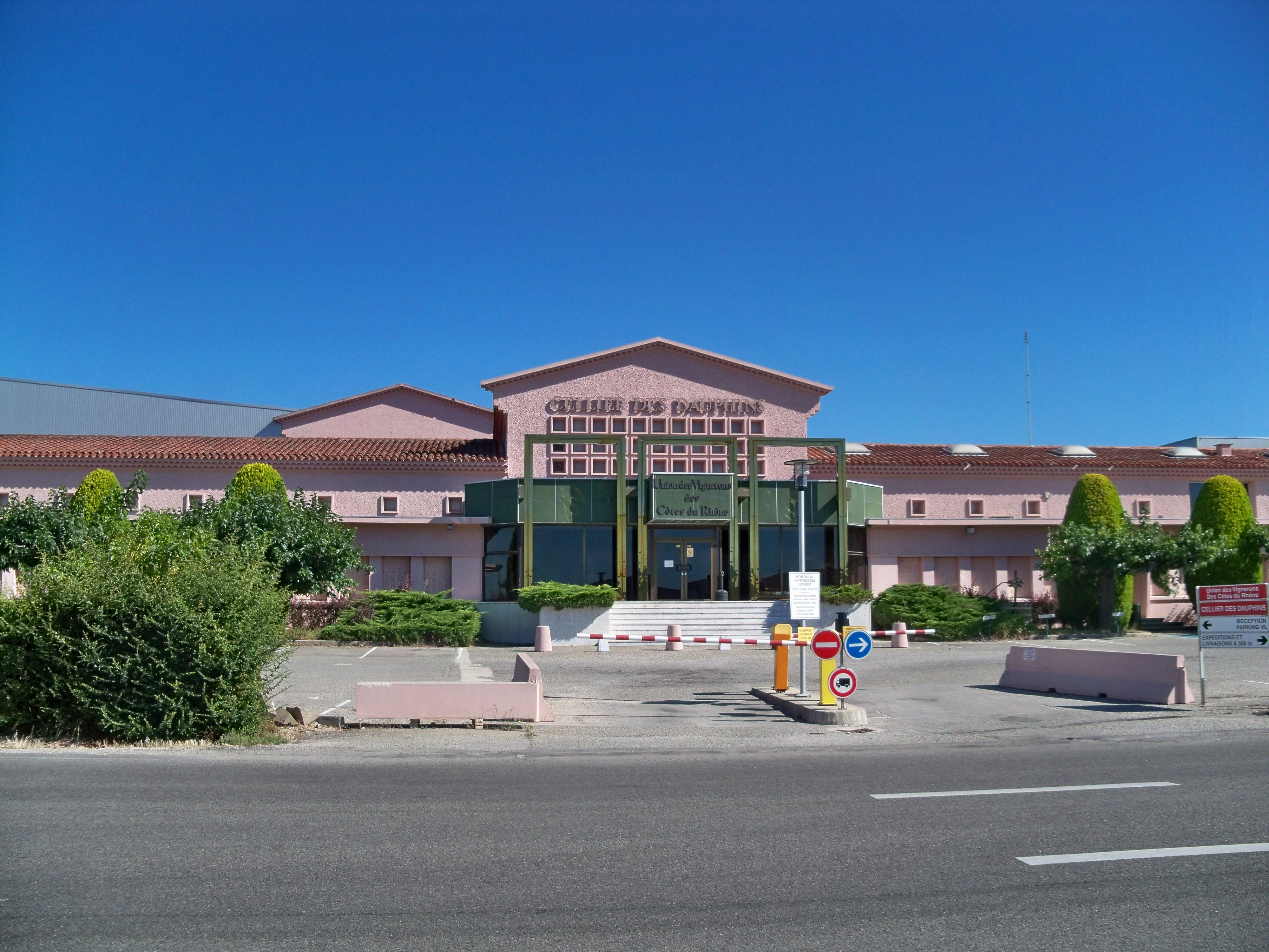 Batiment du Cellier des Dauphins